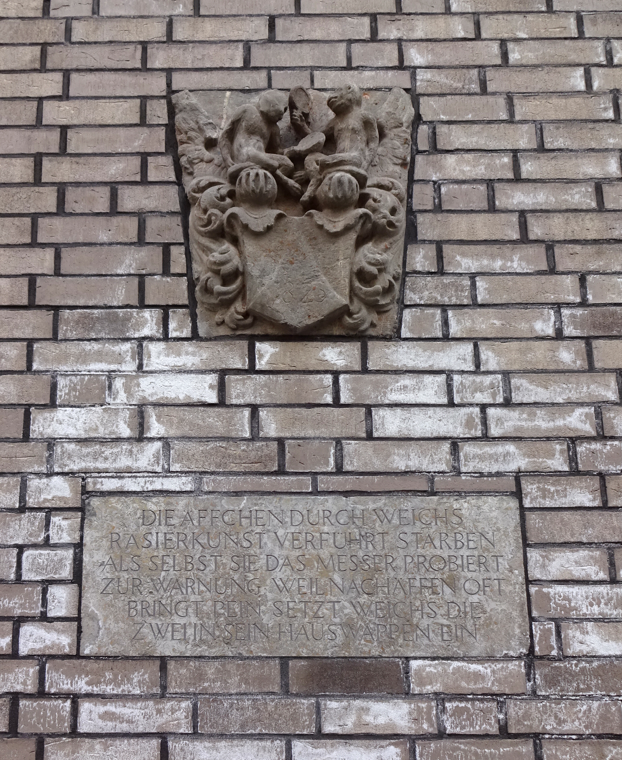 Relief Hauswappen des Freiherrn von Weichs und Spruch am Haus Ratinger Straße 1 an der Seite zur Liefergasse, Düsseldorf-Altstadt